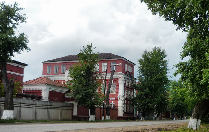 Старинное здание Глазовского Ликёро-Водочного Завода